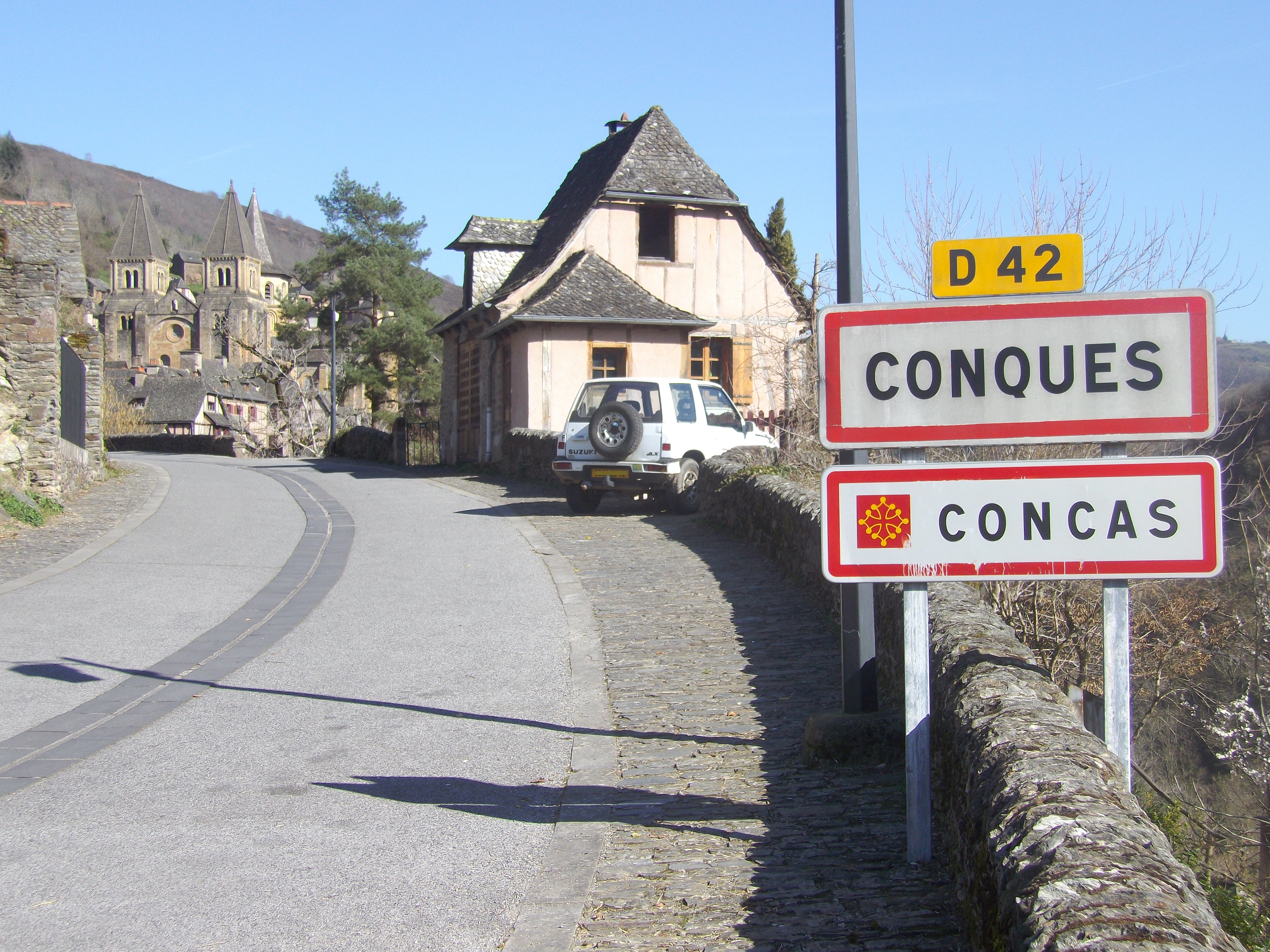 Signalisation bilingue occitan-français à l'entrée de Conques/Concas (Aveyron, France).